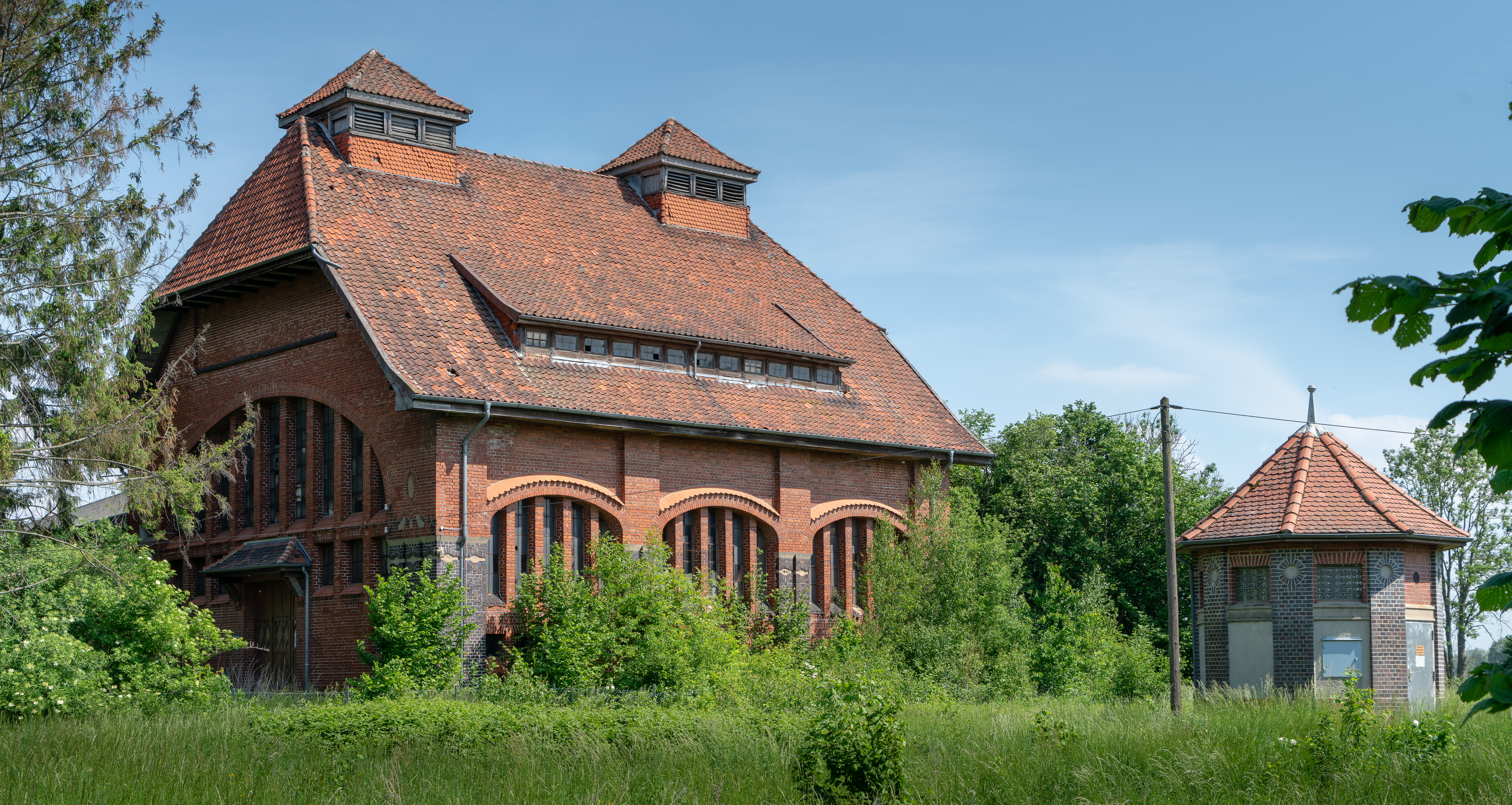 Maschinenhaus des Wasserwerkes Poppenburg, erbaut 1909-1911, nahe Wülfingen, Niedersachsen.